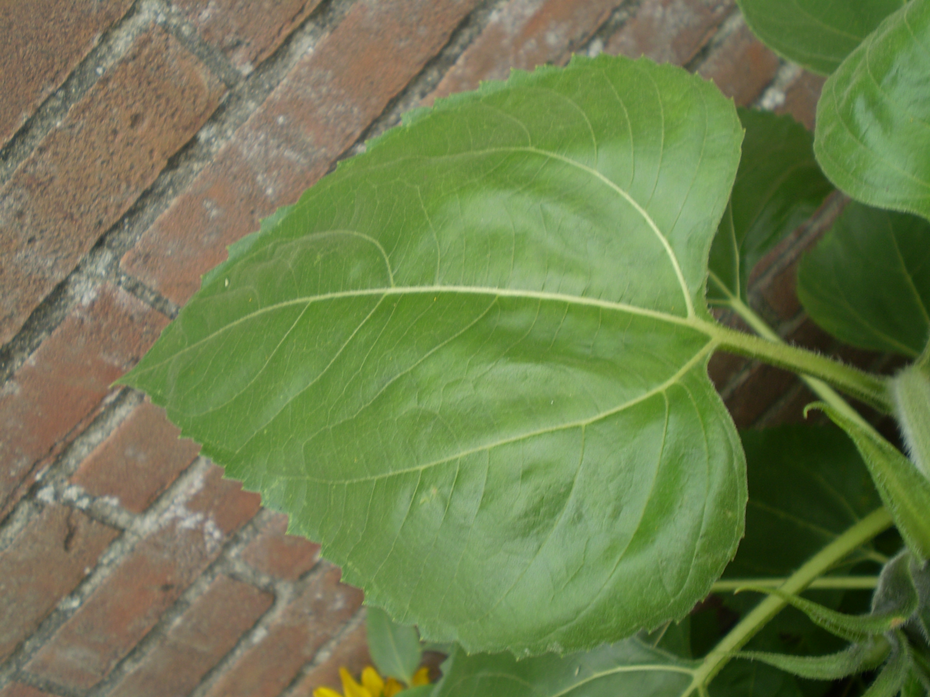 Helianthus anuus.zonnebloem